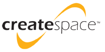 Logo